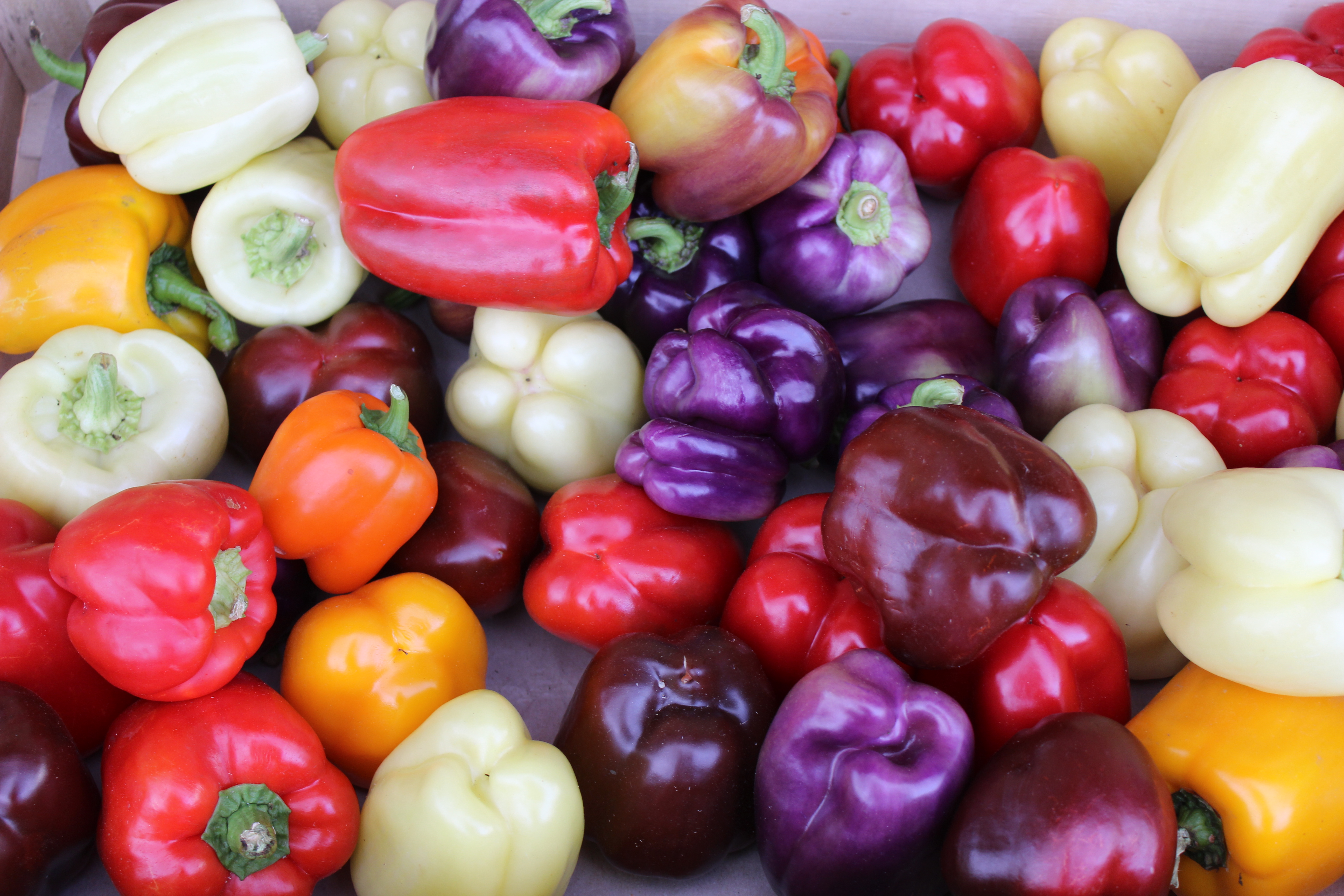 étal de poivrons dans un marché à Trouville.